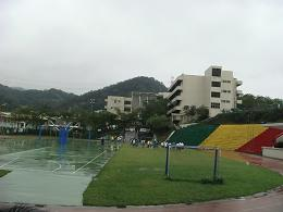 臺北市立永春高中校園。